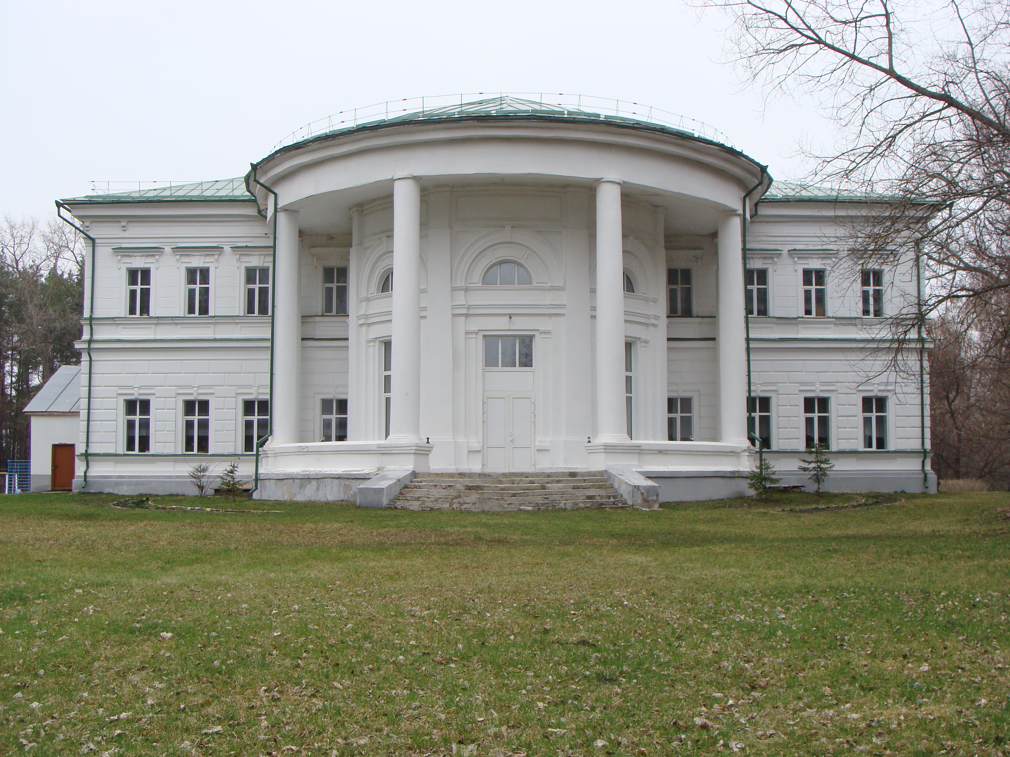 Палац (мур.), , с. Бочечки.